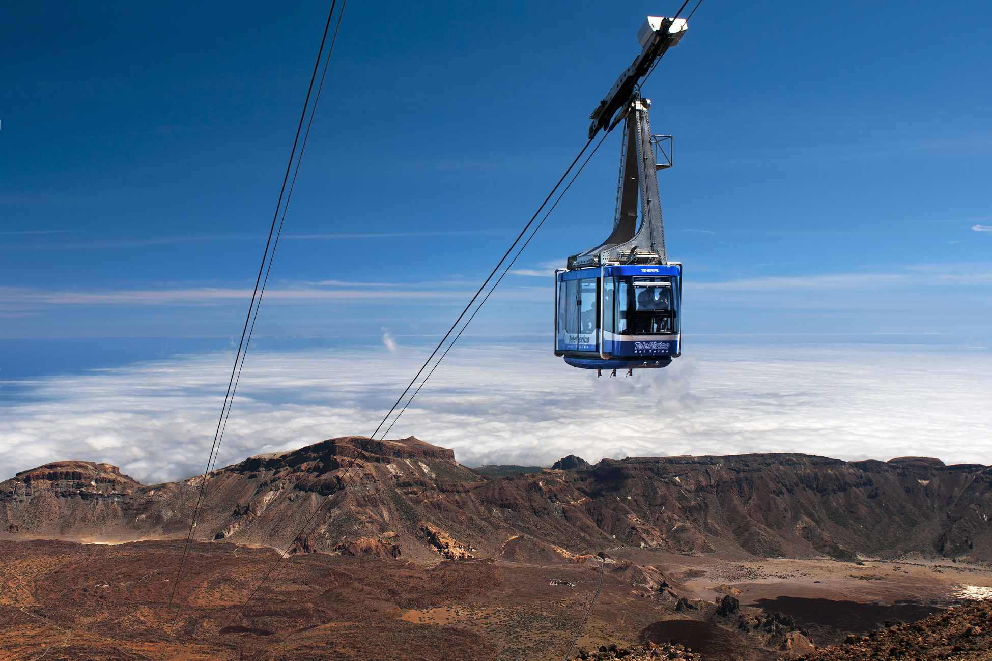 Cabina del Teleférico del Teide con las Cañadas al fondo